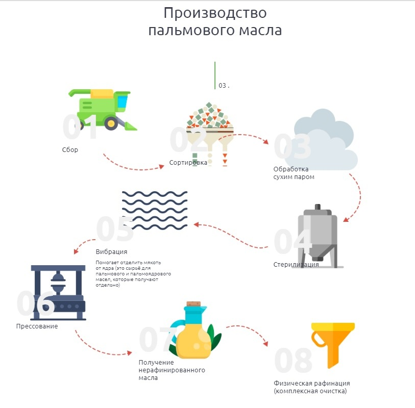 Этапы производства пальмового масла